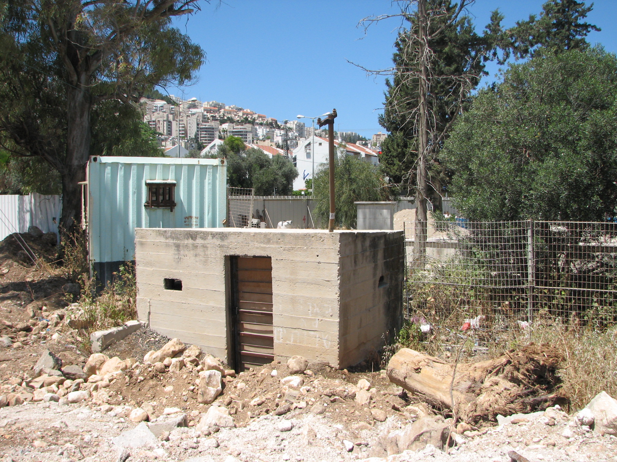 Fortified (concrete) post from 1947 before the 1948 Arab–Israeli War called Milhemet HaAtzma'ut in the small village Nesher. Built to protect the citizen against the Arabs from Balad ash-Sheikh (that was Palestinian town located on the border of Nesher) that used to shoot to the huts of Nesher עמדת בטון מבוצרת ששכנה על גבול שכונת נשר והכפר הערבי בלד א-שייח' . העמדה נבנתה במסגרת הביצורים של נשר בשנת 1947. השכונה הוקפה גדר ועמדות מבוצרות. עמדה זו נמצאת עד היום עלבפינת רחובות דרך השלום (כביש חיפה נצרת לשעבר) וכביש 705 העולה לדניה בחצר תחנת כיבוי אש הנמצאת בבניה. Behind the Blockhouse is the view of Tel Hanan former Balad ash-Sheikh מאחורי עמדת הבטון אפשר לראות את בתי שכונת תל חנן ששוכנת במקומה של בלד א-שייח